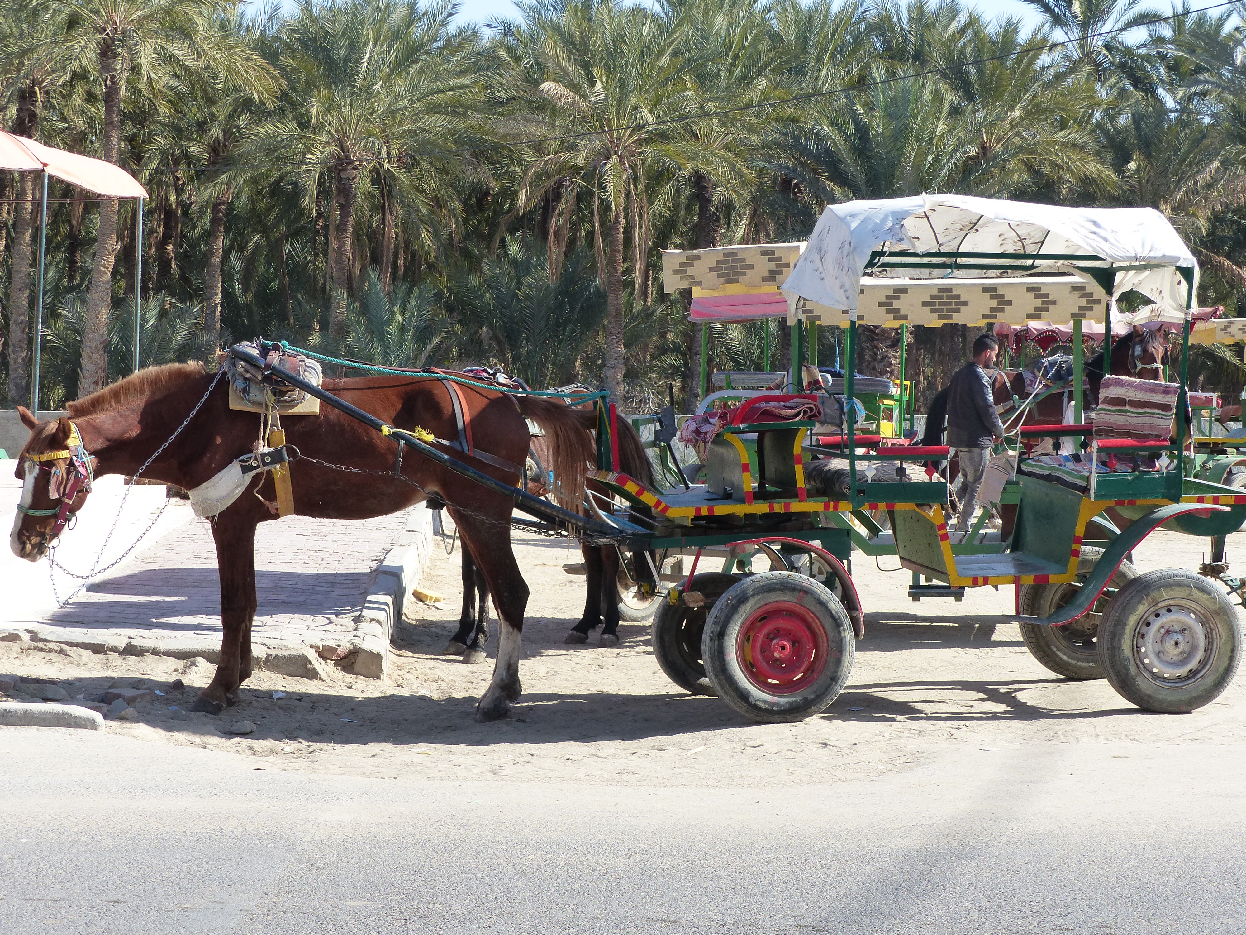 Attelage touristique à Tozeur, en Tunisie